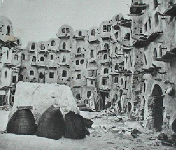 Ksar Nalut in Nalut,Libya.